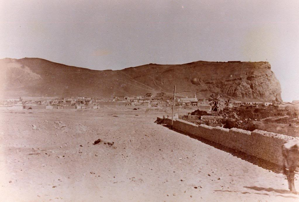 Morro de Arica desde el fuerte San Jose, 1879